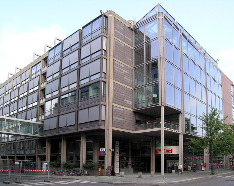 VG-huset, Akersgata, Oslo, Norway.